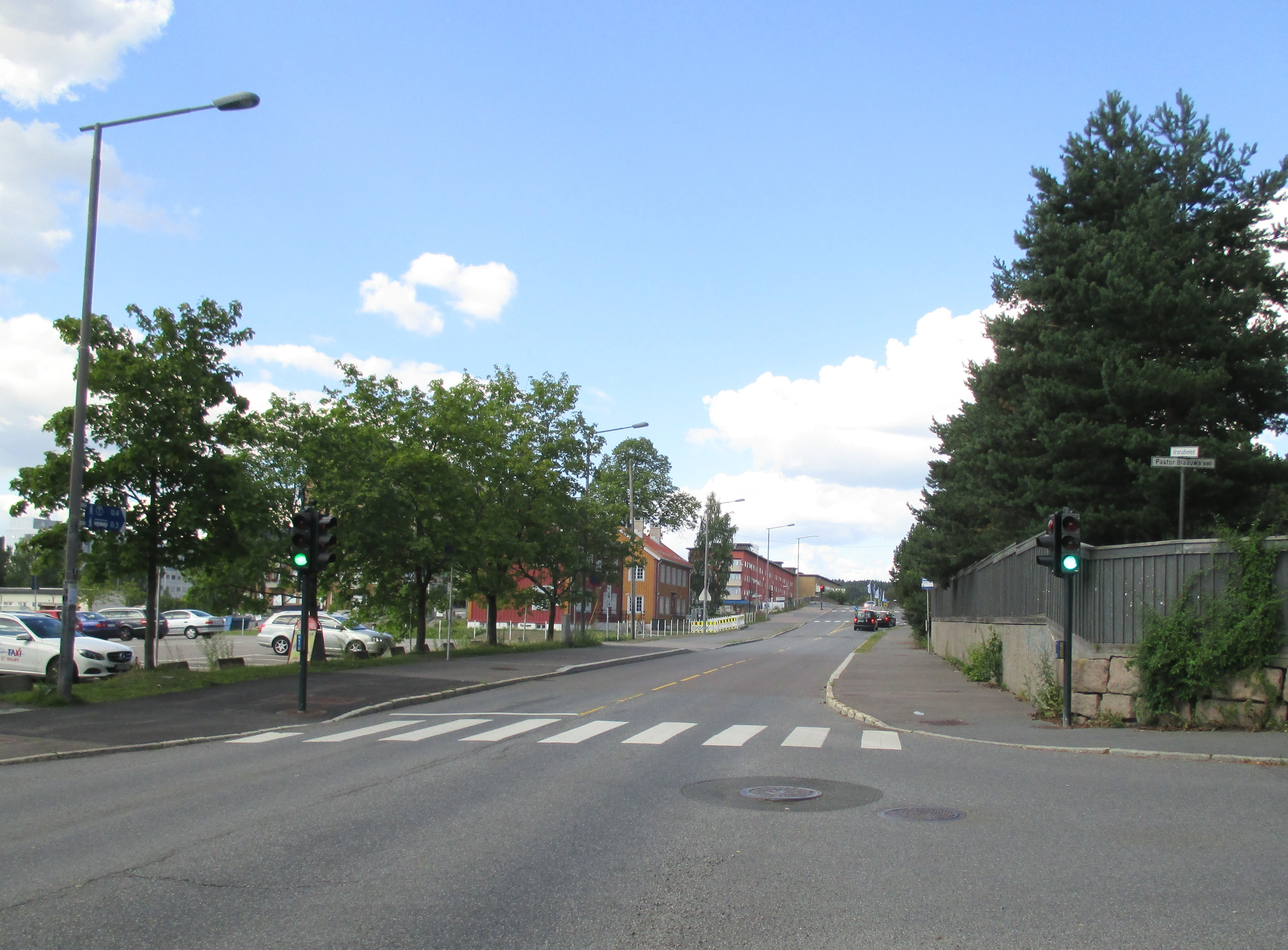 Grorudveien sett oppover fra krysset ved Pastor Blaauws vei og Rasmusbakken